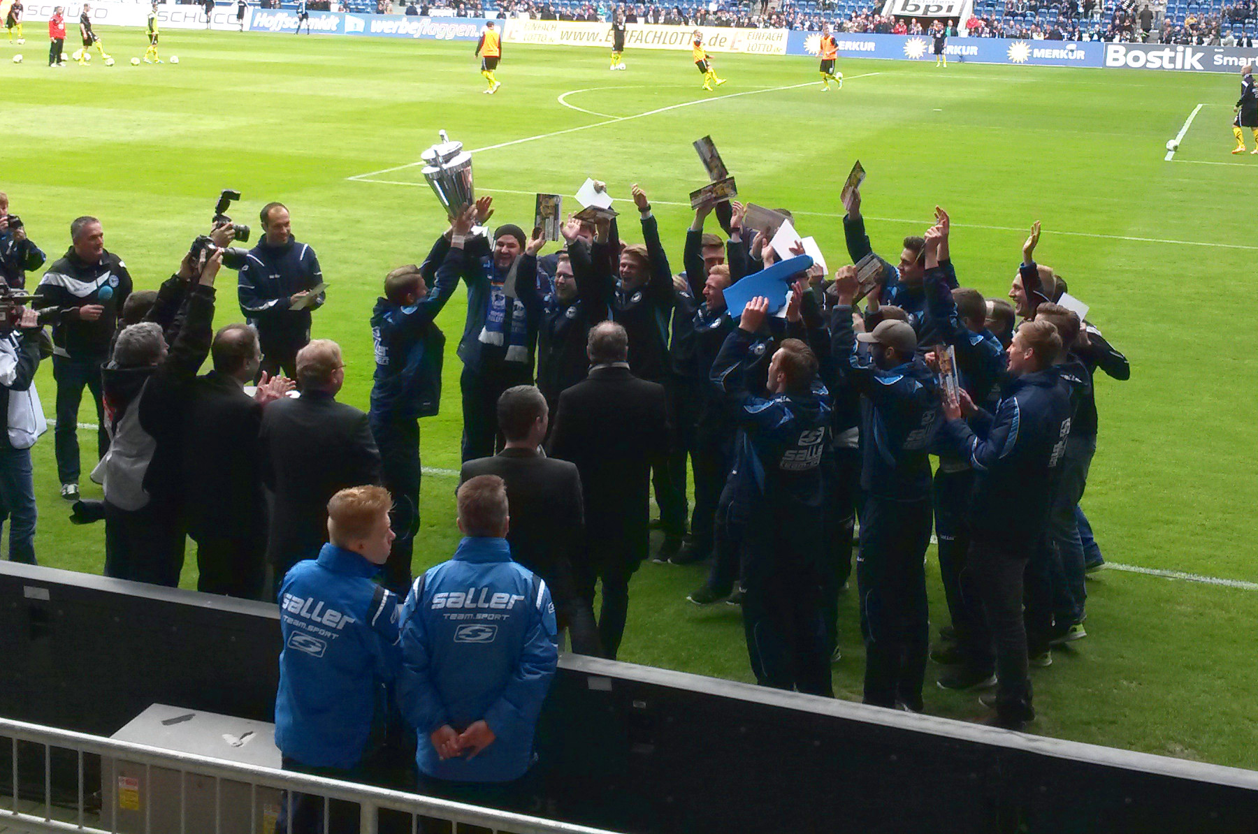 Die U23-Mannschaft des DSC Arminia Bielefeld feiert am 4. Mai 2014 den Gewinn der Meisterschaft in der Oberliga Westfalen auf der Bielefelder Alm. Die Meisterschaft wurde durch einen 2:1 Sieg am Tag zuvor gegen den TuS Erndtebrück erreicht.